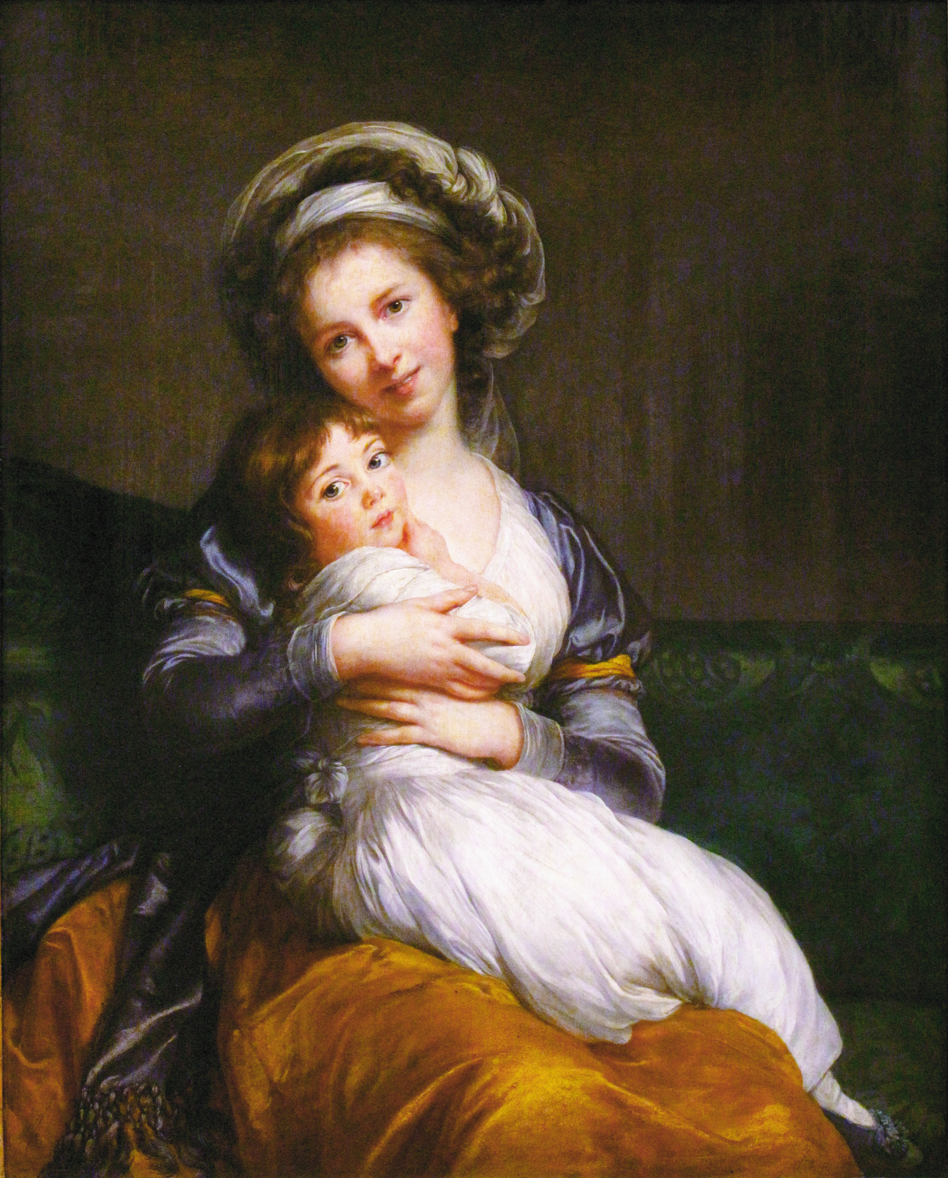 Madame Vigée-Le Brun et sa fille, Jeanne-Lucie, dite Julie (1780 - 1819).